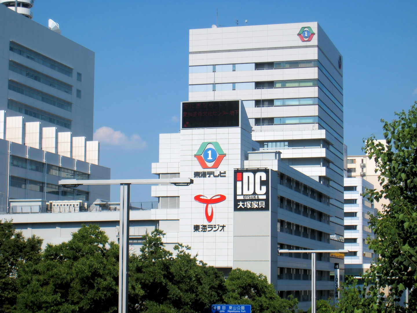 IDC大塚家具ショールームに転用された東海テレビ・東海ラジオ本社旧社屋